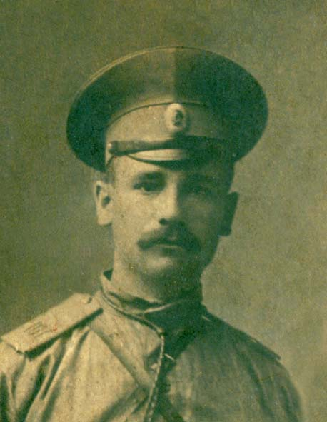 Фото Никифора Блаватного: Зображено Никифора Блаватного у військовому строї